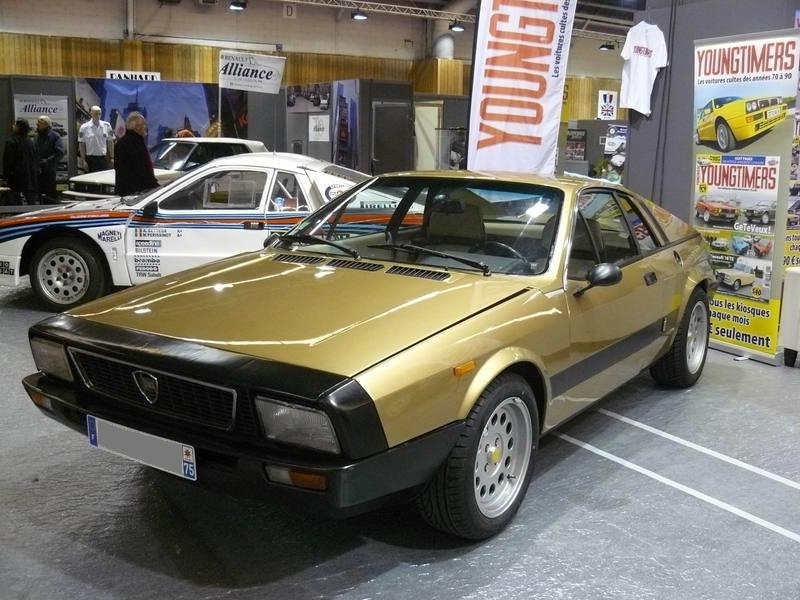 Retromobile 2012